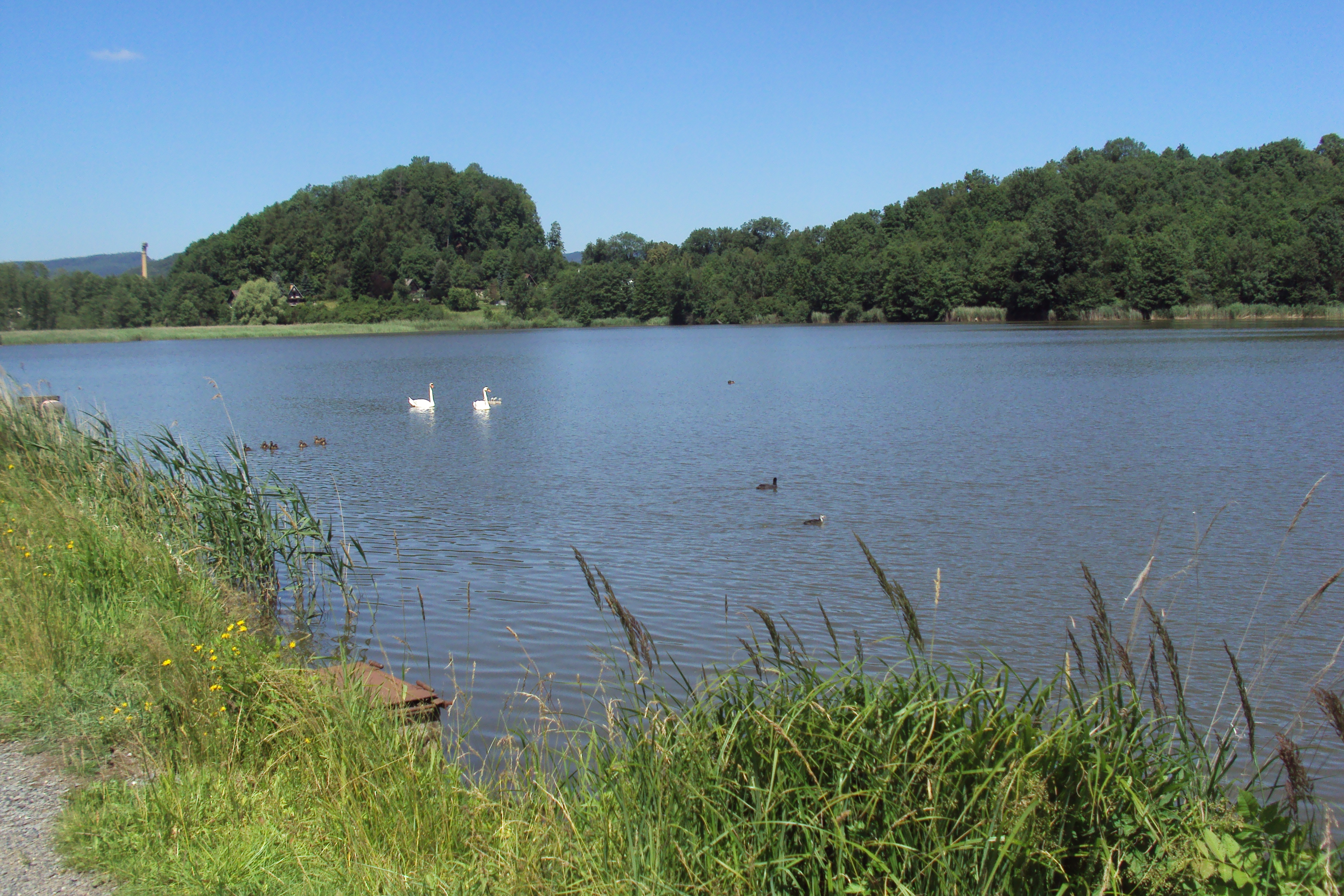 Pivovarský rybník na okraji obce Pihel u Nového Boru